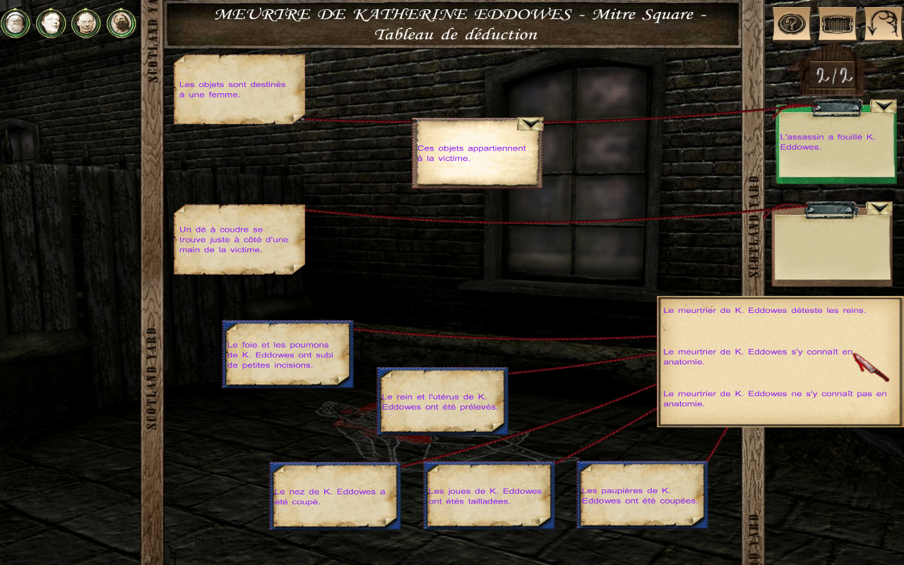 Capture d'écran du jeu Sherlock Holmes contre Jack l'Éventreur. Il s'agit ici du tableau de déductions pour le meurtre de Catherine Eddowes. Comme son nom l'indique, ce tableau permet de déduire, à partir des observations de Holmes ou Watson, des éléments au sujet du meurtrier. Droitier ? Gaucher ? C'est à ce genre de questions que ce tableau permet de répondre.